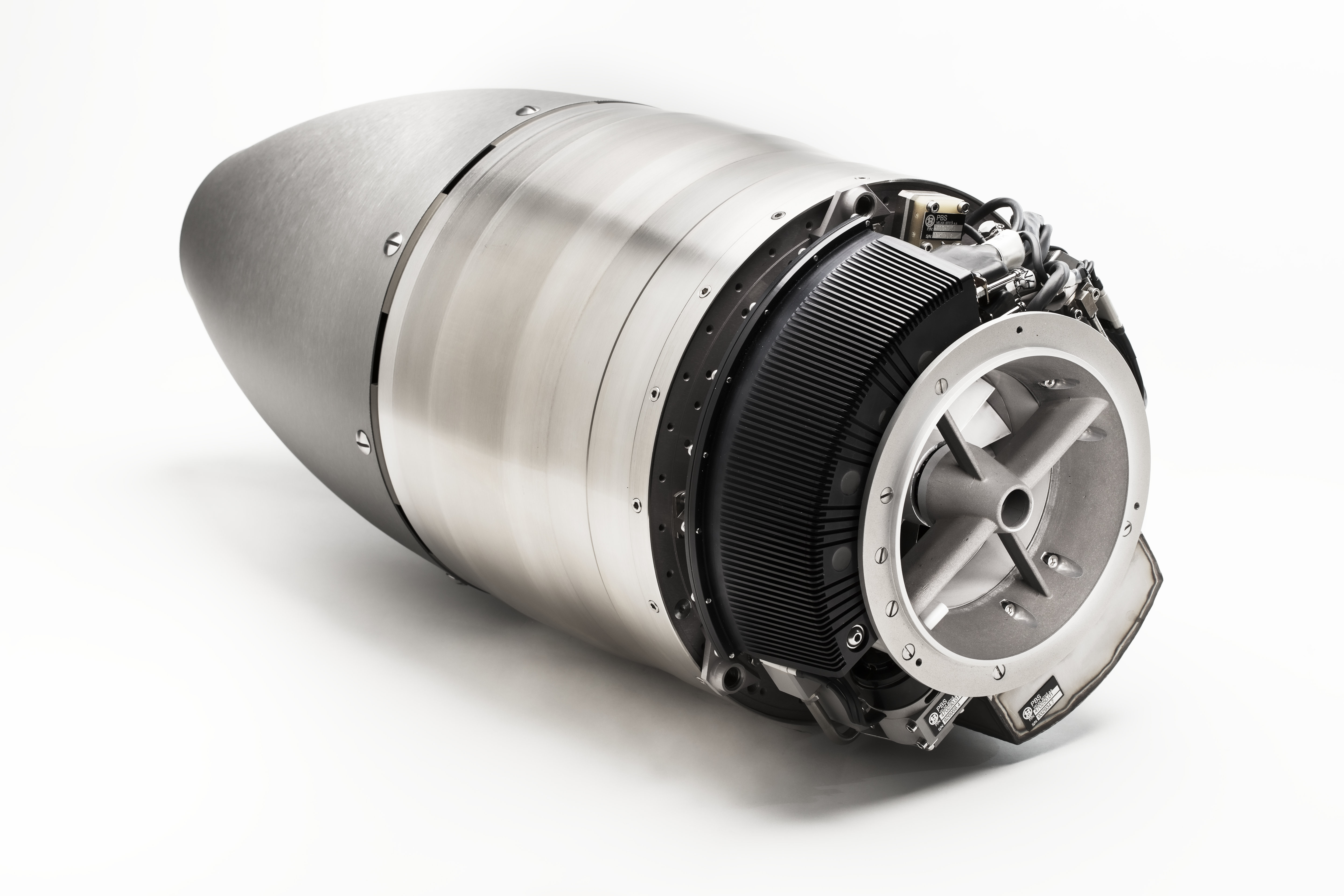 Turbojet engine TJ100